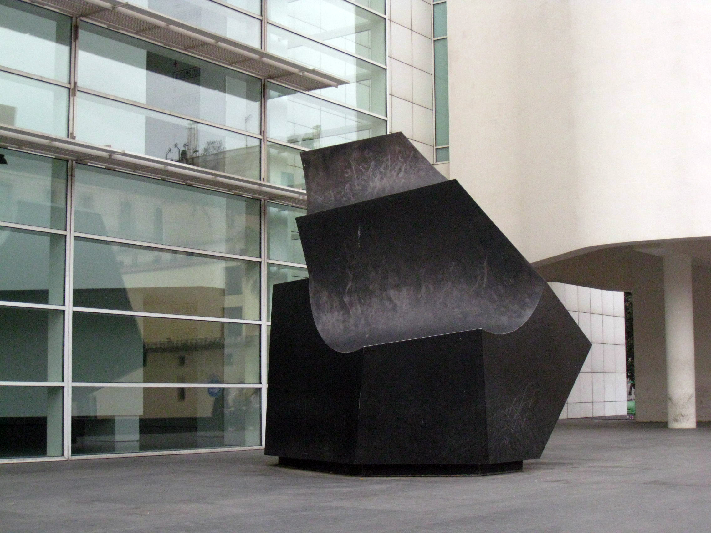 L'ona (Jorge Oteiza). Pl. dels Àngels (Barcelona)